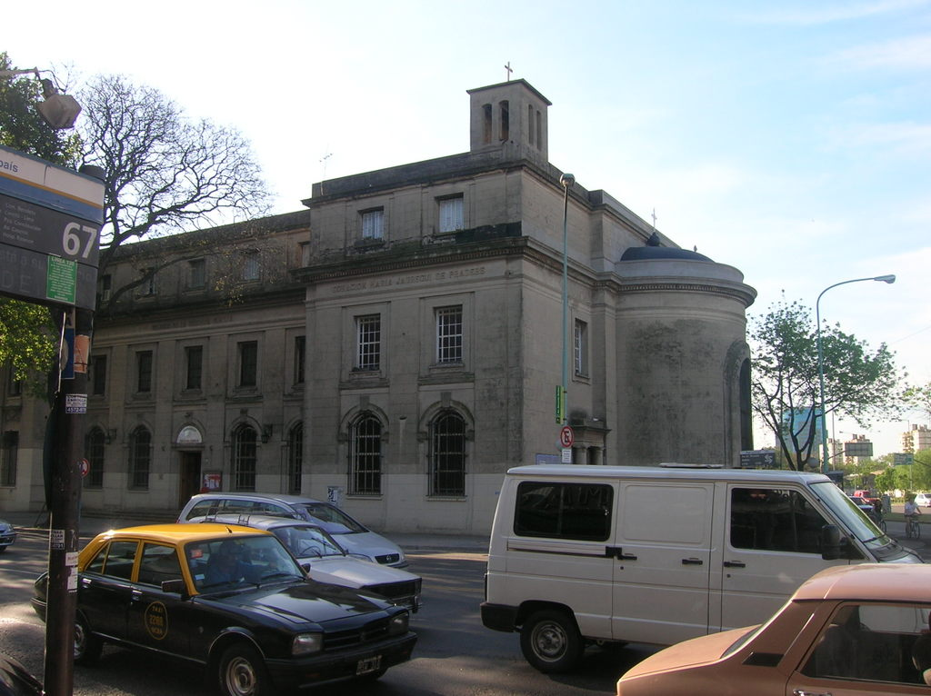 Iglesia de la Sagrada Familia, en la esquina de Avenida Ricardo Balbín con Avenida Goyeneche. Barrio de Saavedra, Buenos Aires.